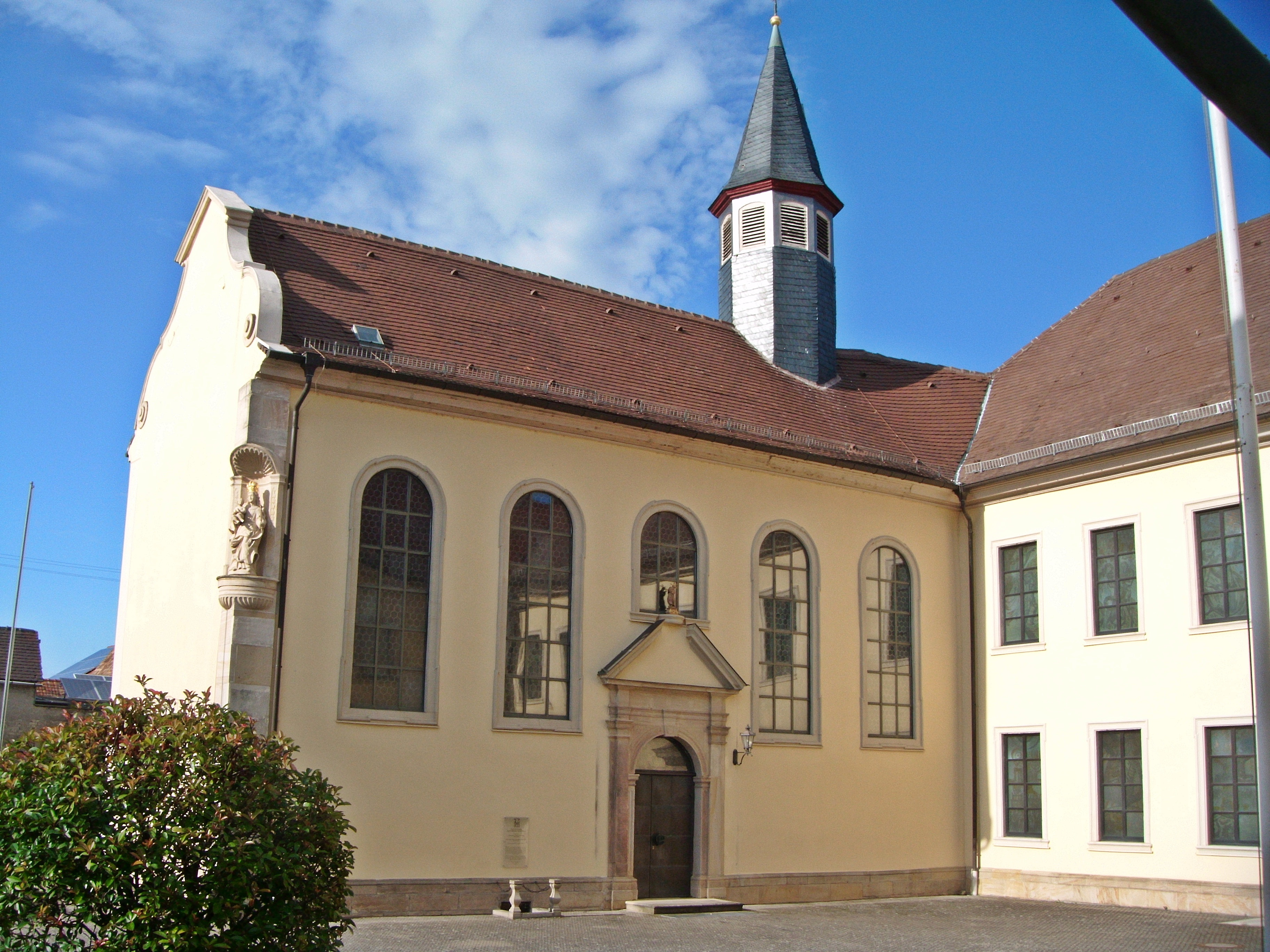 Hallbergsches Schloss Fußgönheim, Kirchenflügel (Nordwestflügel)